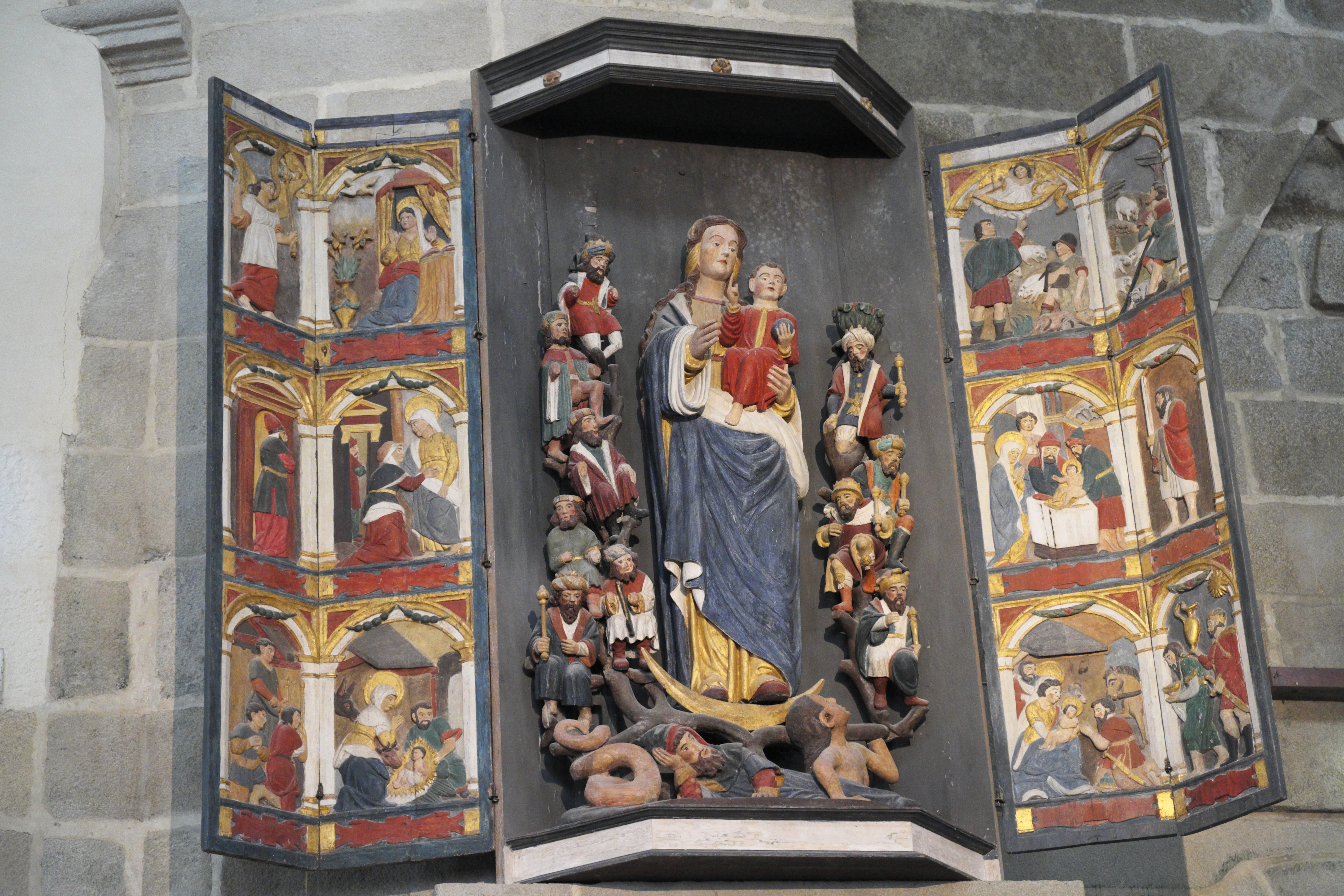 Katholische Pfarrkirche Notre-Dame in Saint-Thégonnec im Département Finistère (Region Bretagne/Frankreich), Notre-Dame-de-Bon-Secours